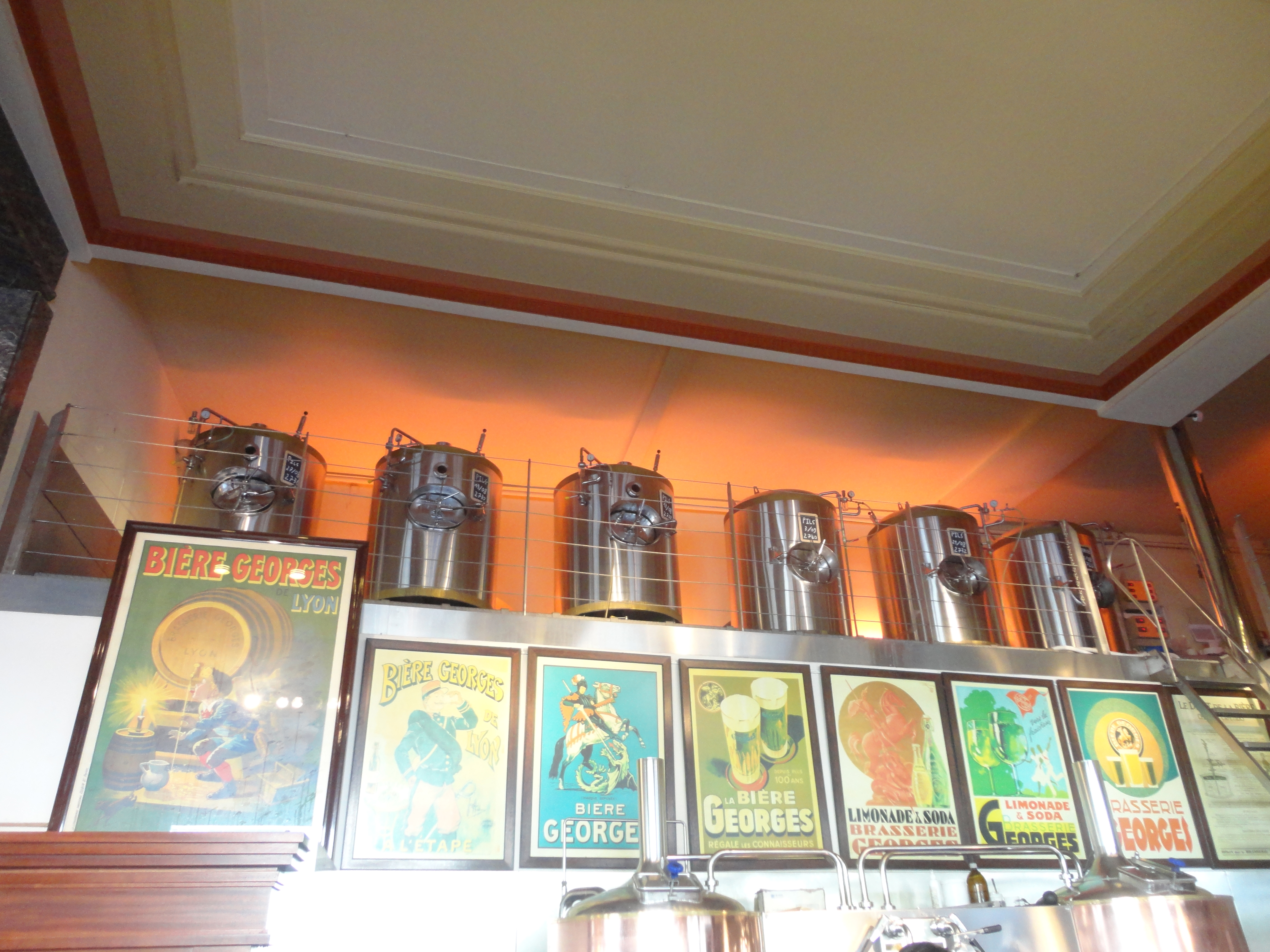 Fûts de Bière de la Brasserie Georges à Lyon (France).